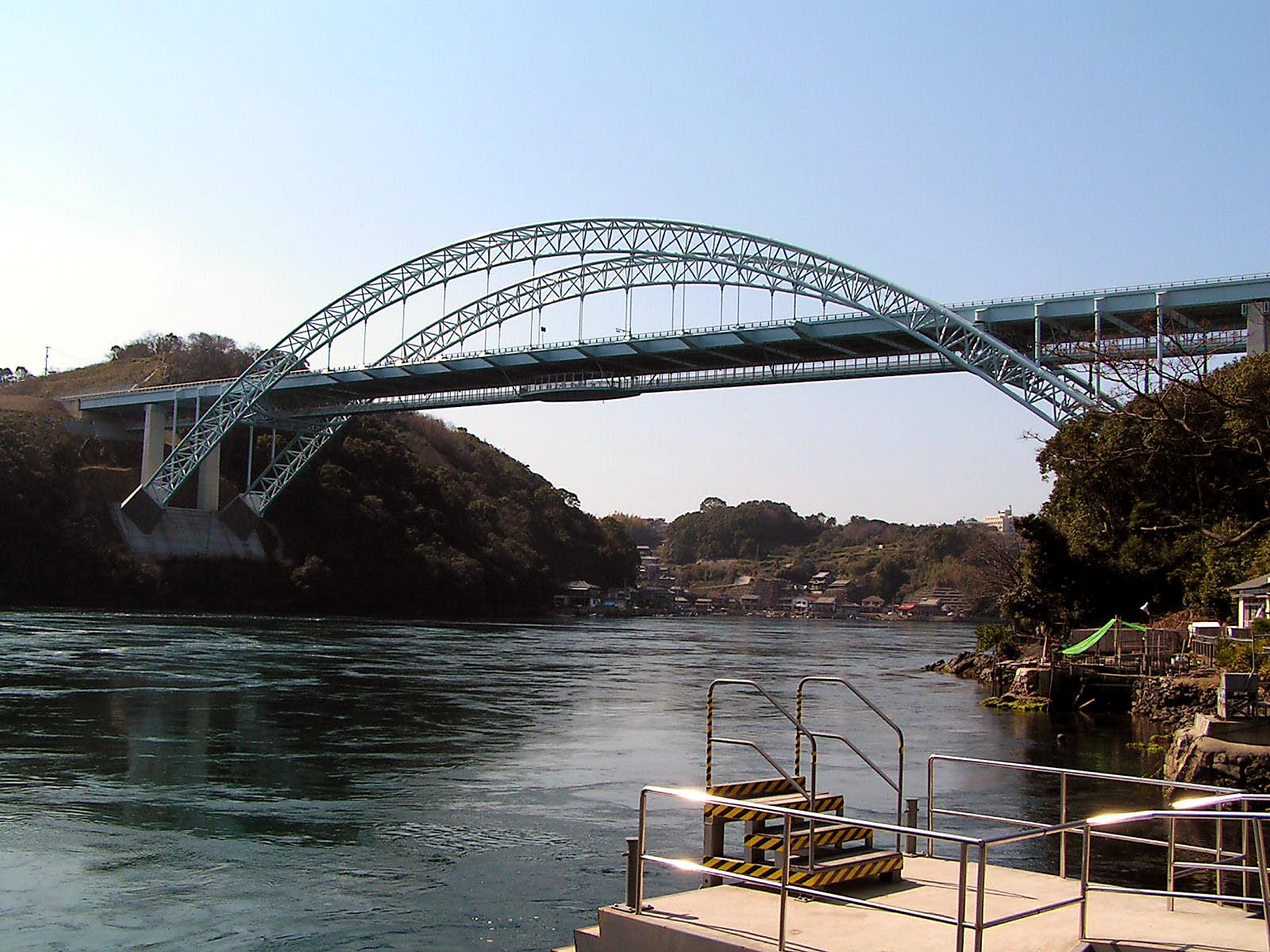 2007年3月に投稿者(seiya0130)自身が撮影。 Category:佐世保市の画像